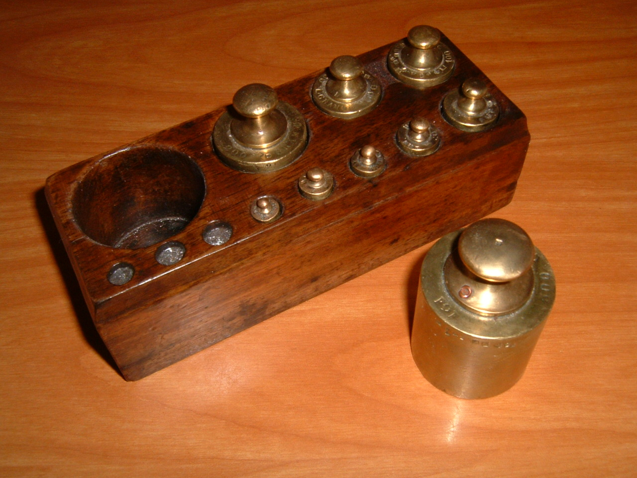 Masses anciennes cylindriques.